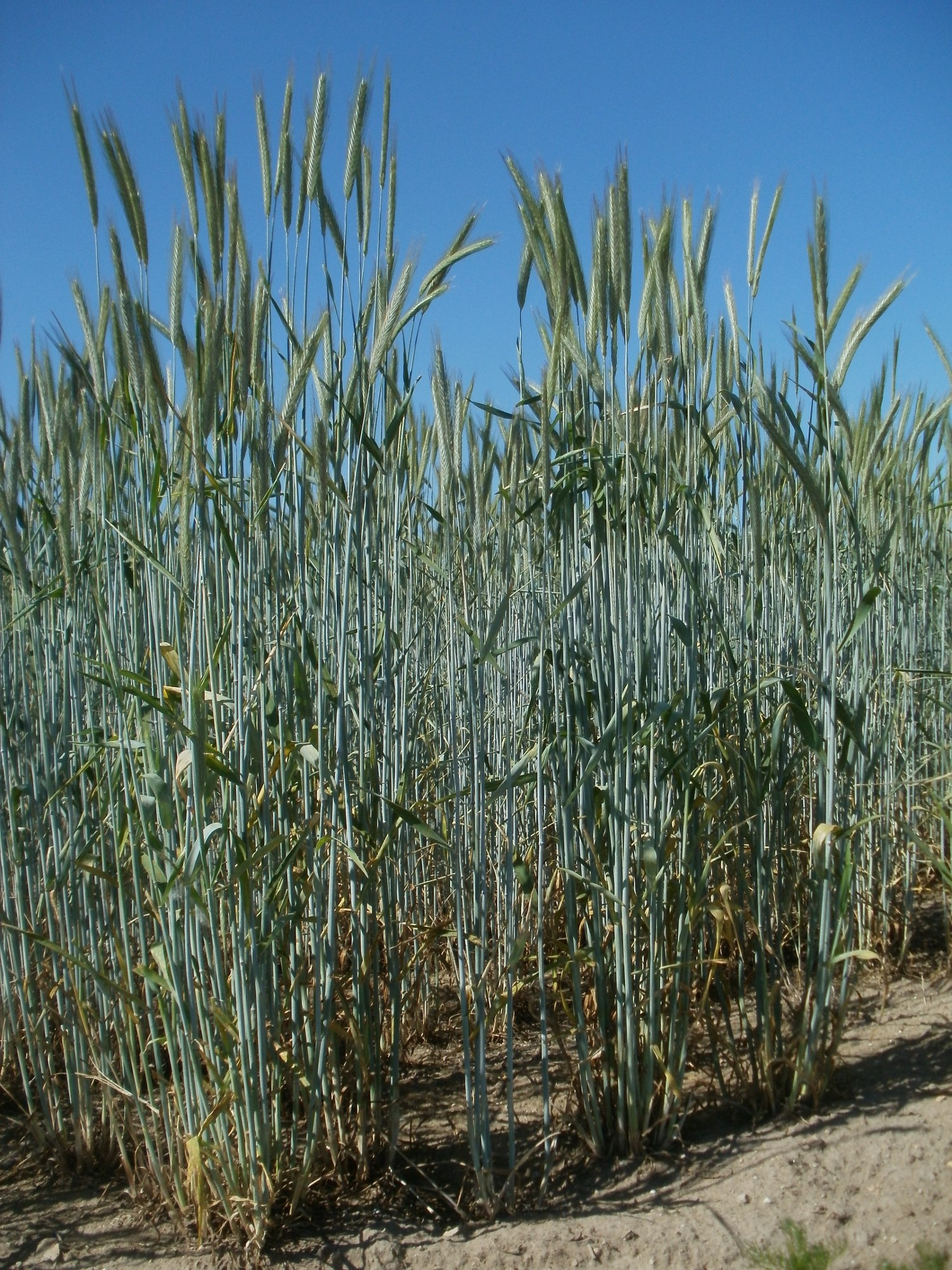 Roggenfeld bei Ketsch